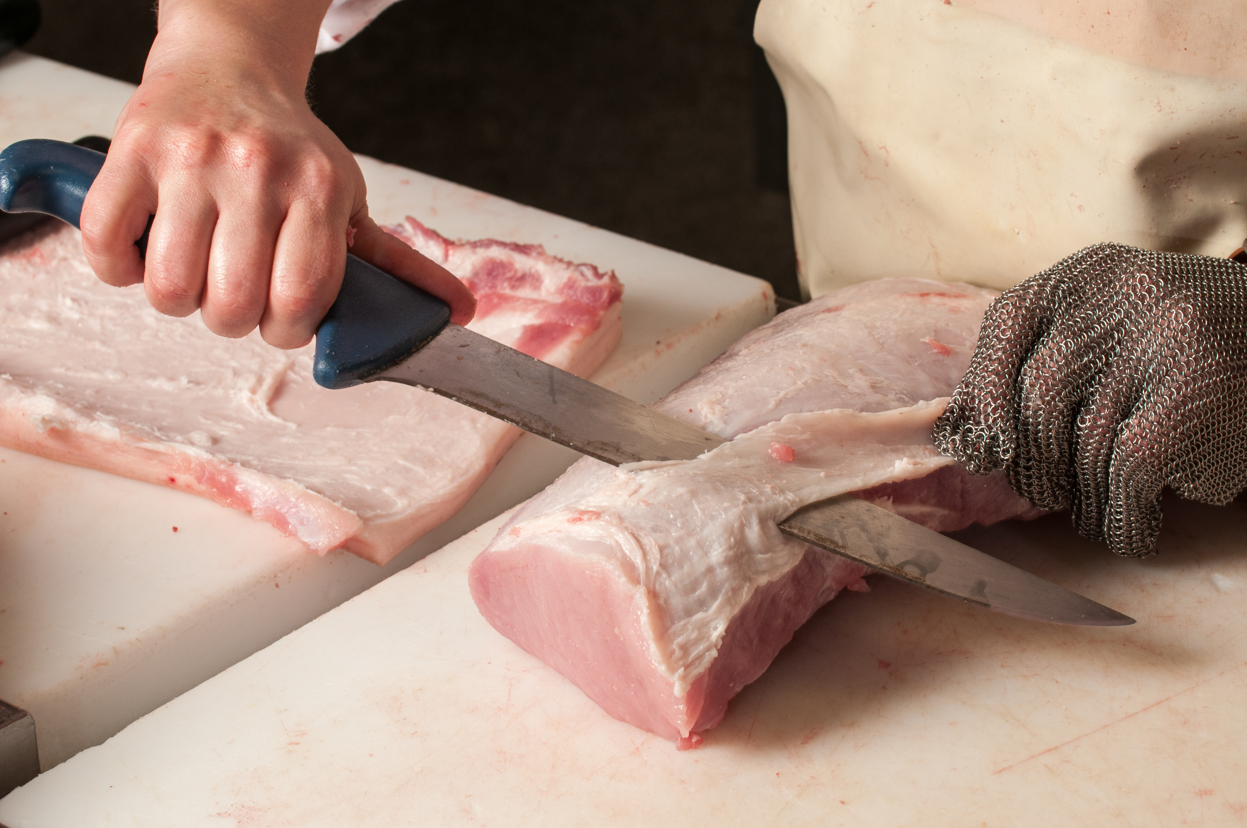 Wiki Loves Mett: Beschneiden des abgeschwarteten Kotelettstrangs